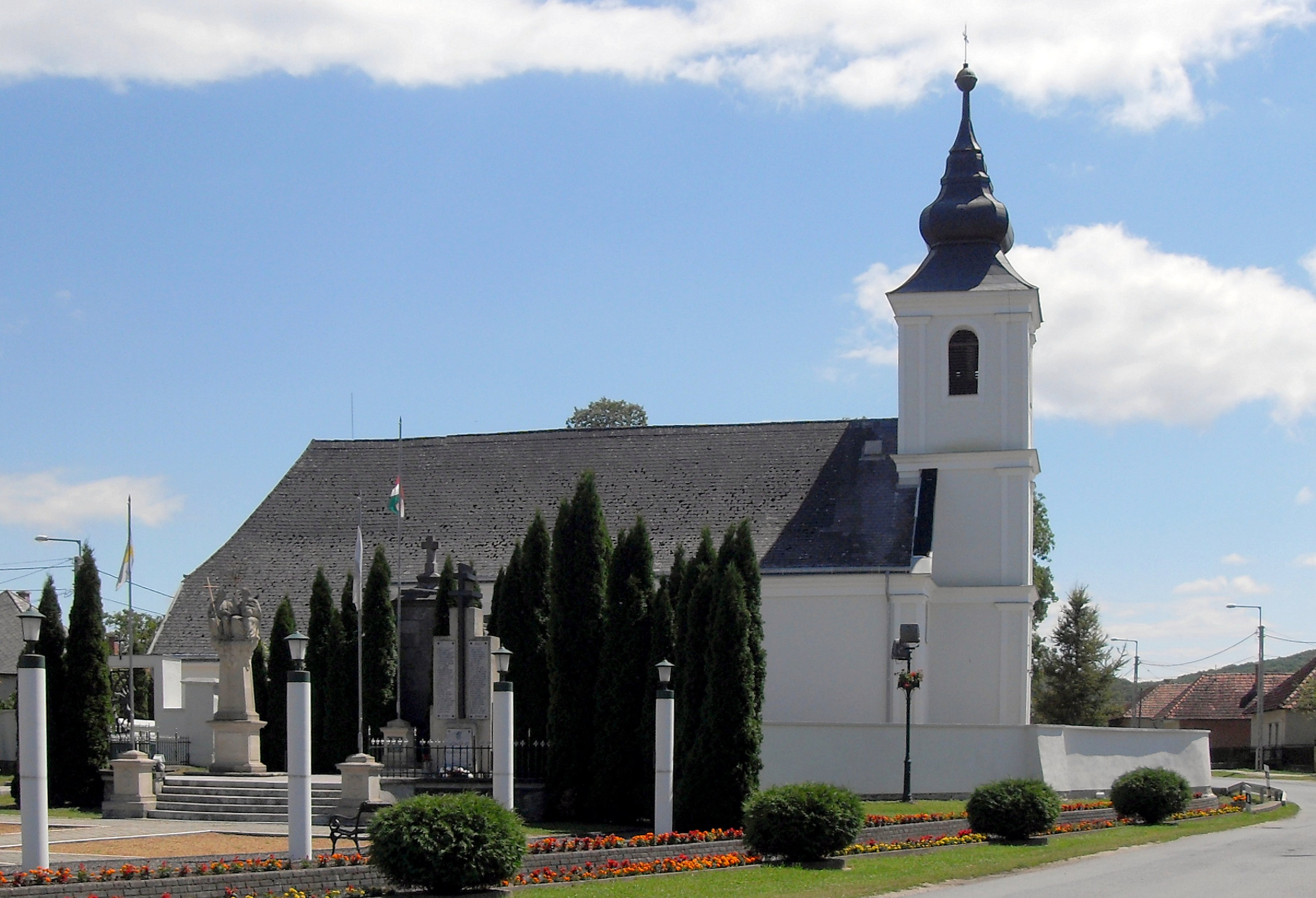 Gyümölcsoltó Boldogasszony templom Hidvégardó